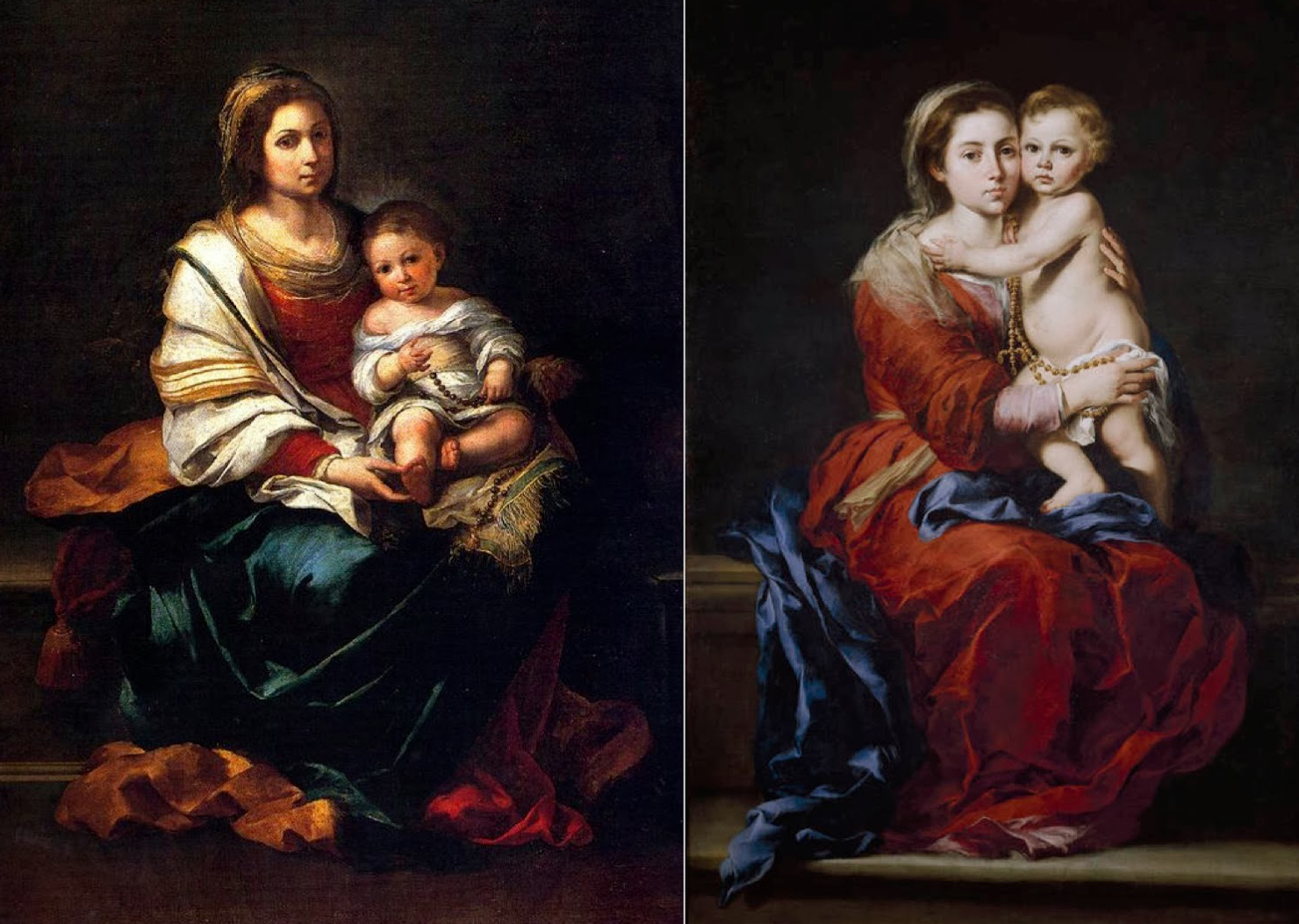 Pinturas de la Virgen del Rosario con Niño de Bartolomé Esteban Murillo conservadas en el Museo de Goya en Castres y en el Museo del Prado en Madrid